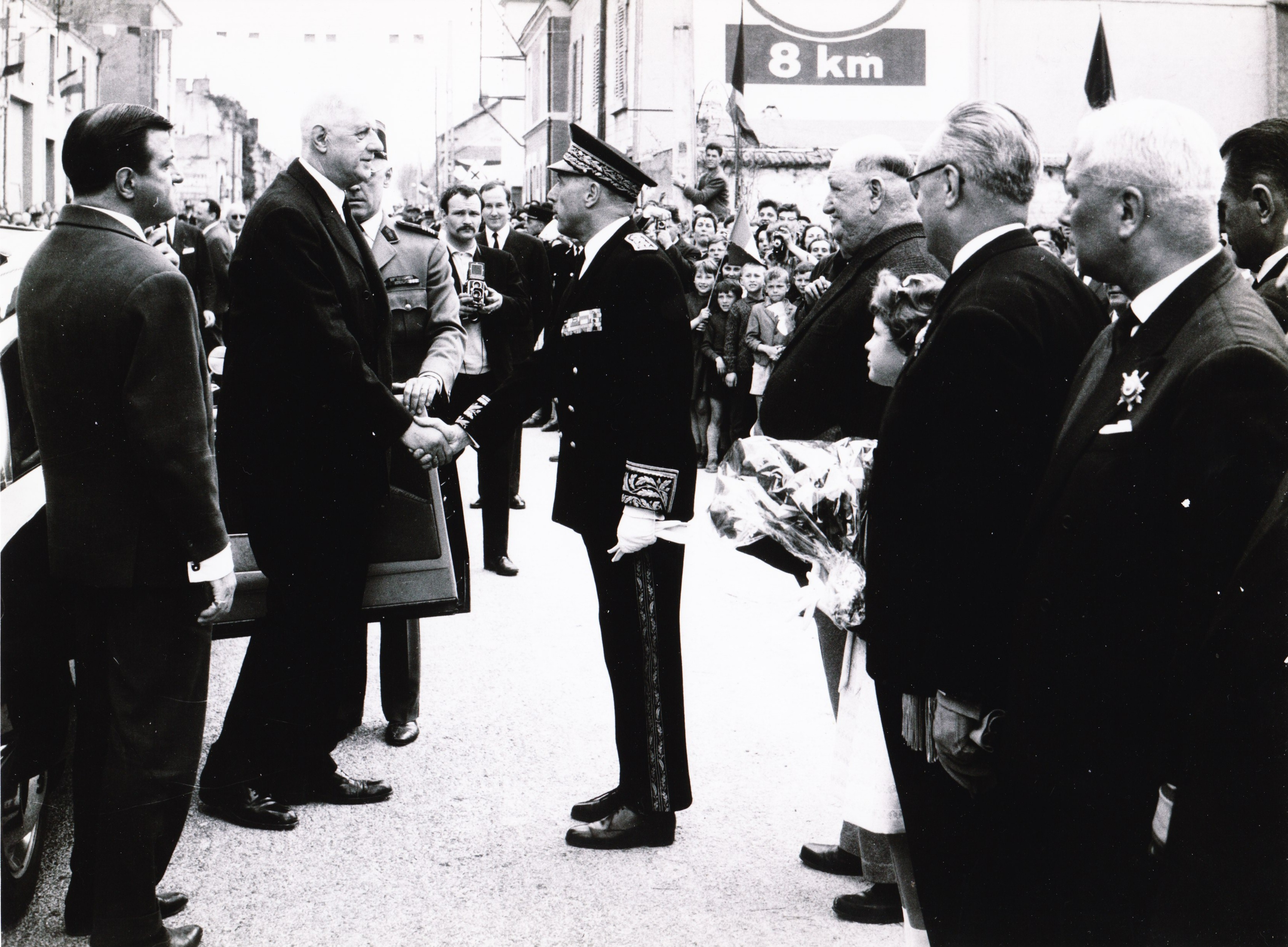 Le président de la république Française Charles de Gaulle salut le préfet Mr Vie, devant le maire Mr Dolhem le 22 Avril 1963 à Isles Suippe.